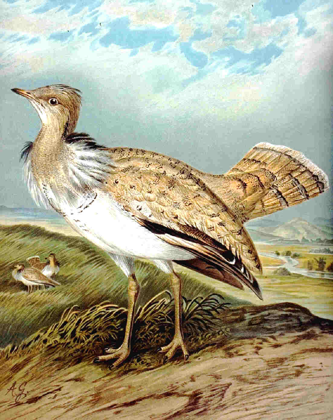 Macqueen's Bustard Chlamydotis macqueenii (syn. Chlamydotis undulata macqueenii)